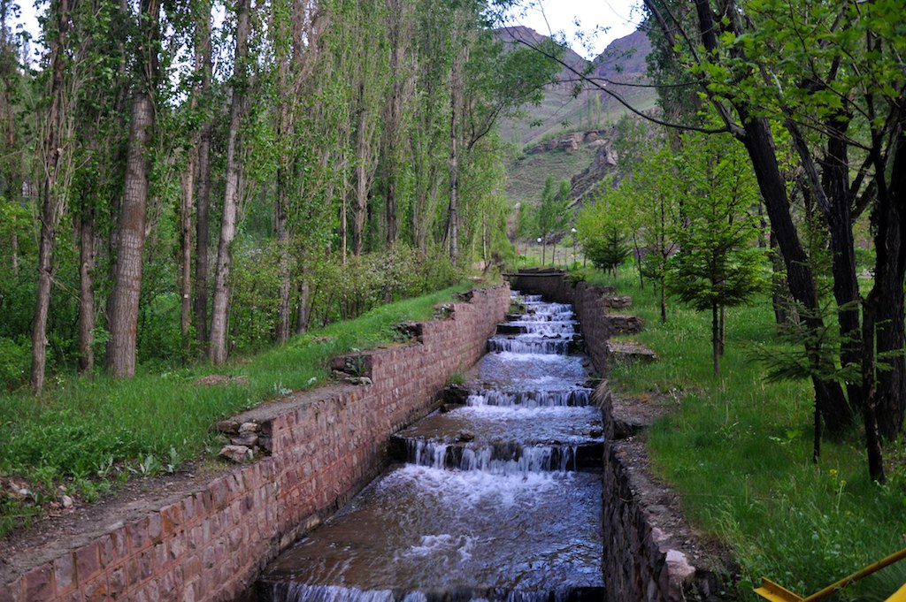 Gajereh